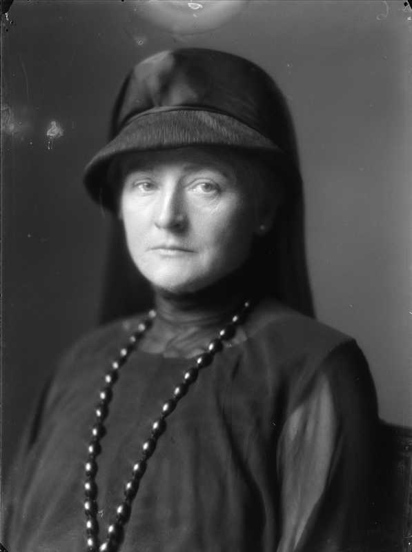 Forfatteren Barbra Ring, fotografert av Ernest Rude i 1920.